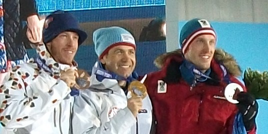 На церемонии награждения олимпийскими медалями победителей в соревнованиях по биатлону на XXII зимних Олимпийских играх. Слева направо: Ярослав Соукуп - бронза; Уле-Эйнар Бьёрндален - золото, Доминик Ландертингер - серебро.